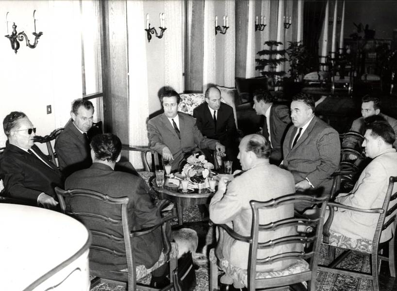 Srpski (latinica): Prijem delegacije Kosmeta kod J.B. Tita, Brioni, 24.06.1966